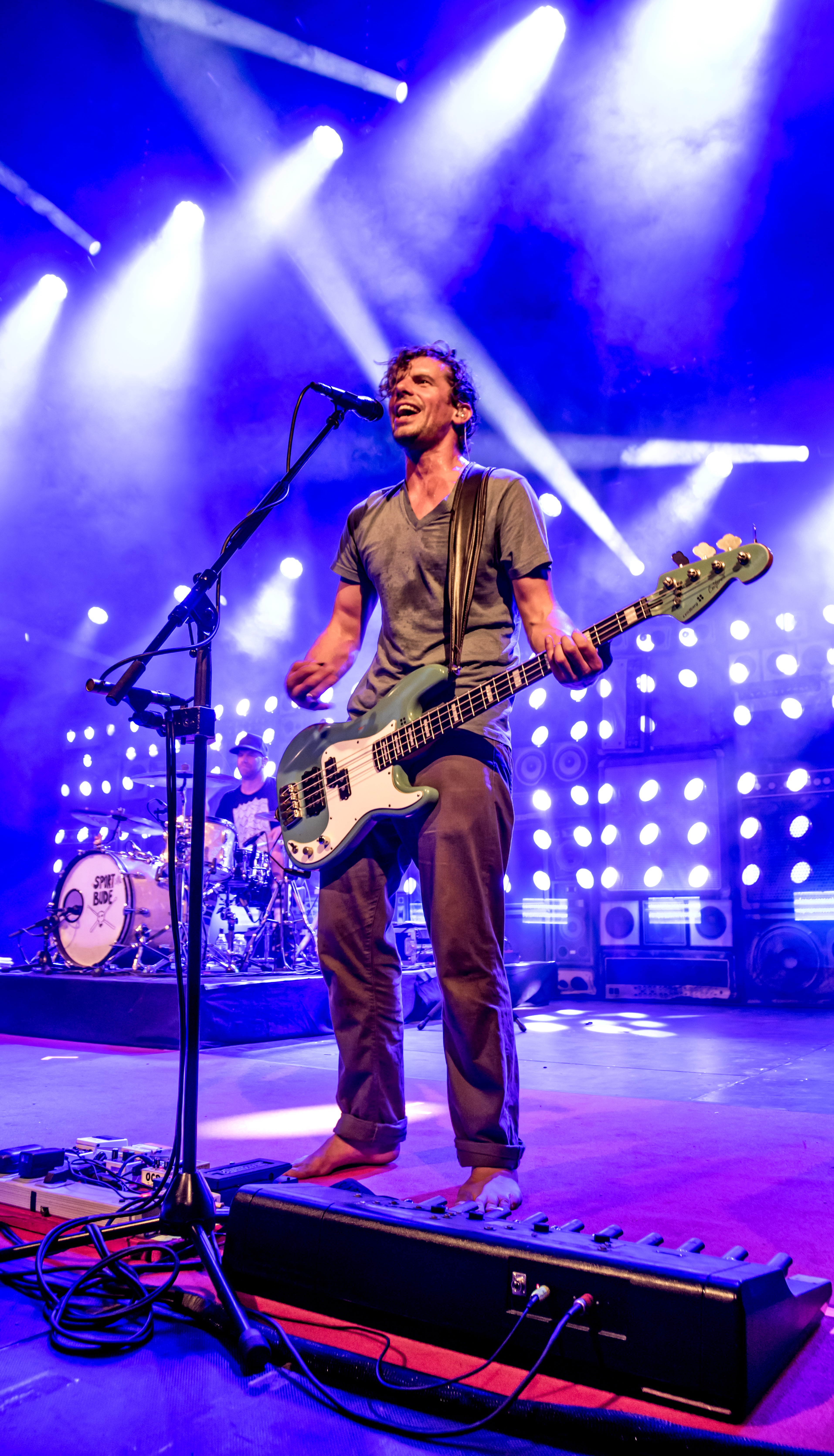 Bilder vom Zelt Musik Festival 2017 in Freiburg im Breisgau Sportfreunde Stiller am 18.07.2017